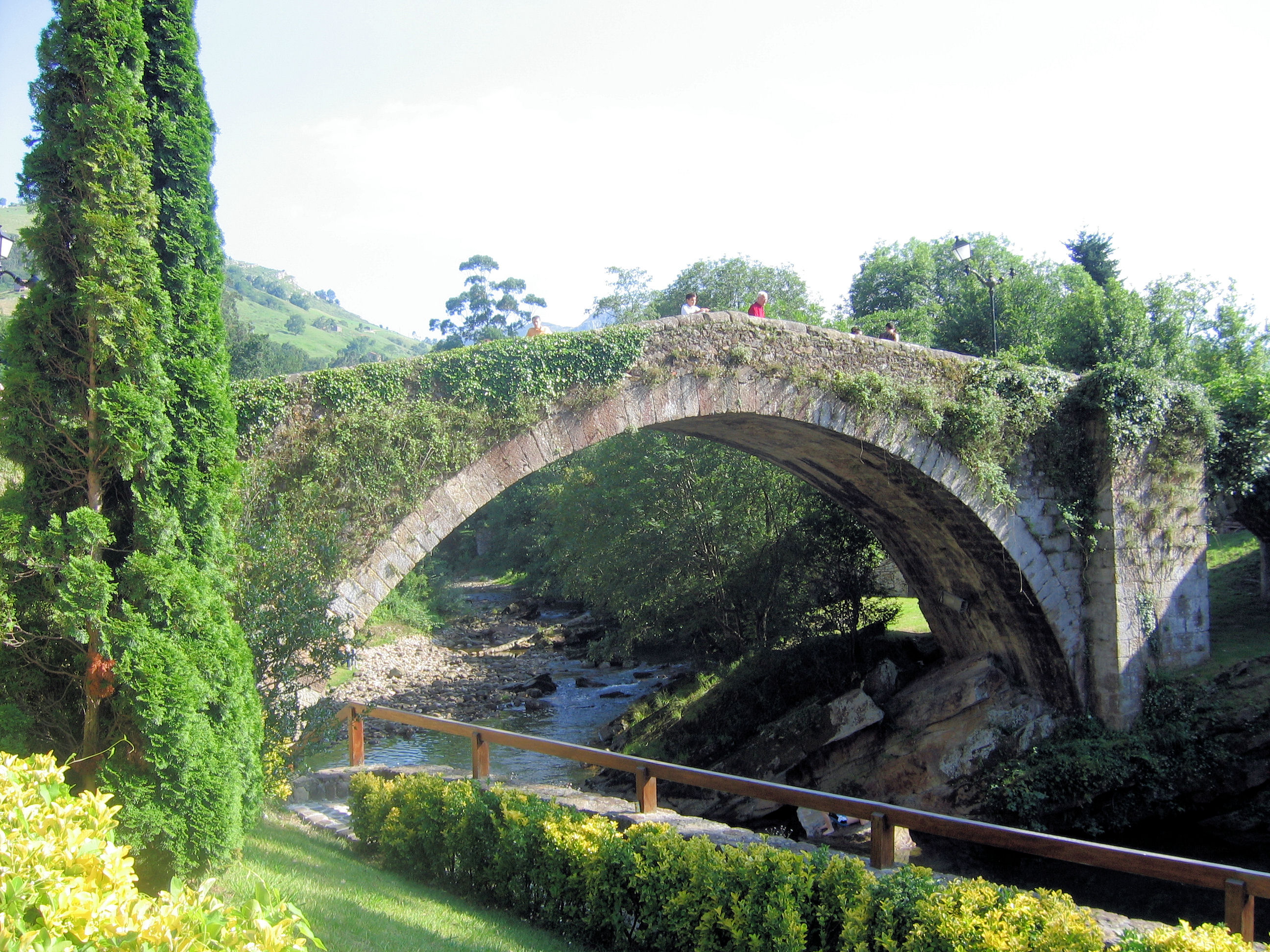 "Puente Romano" at Liérganes, Cantabria, Spain